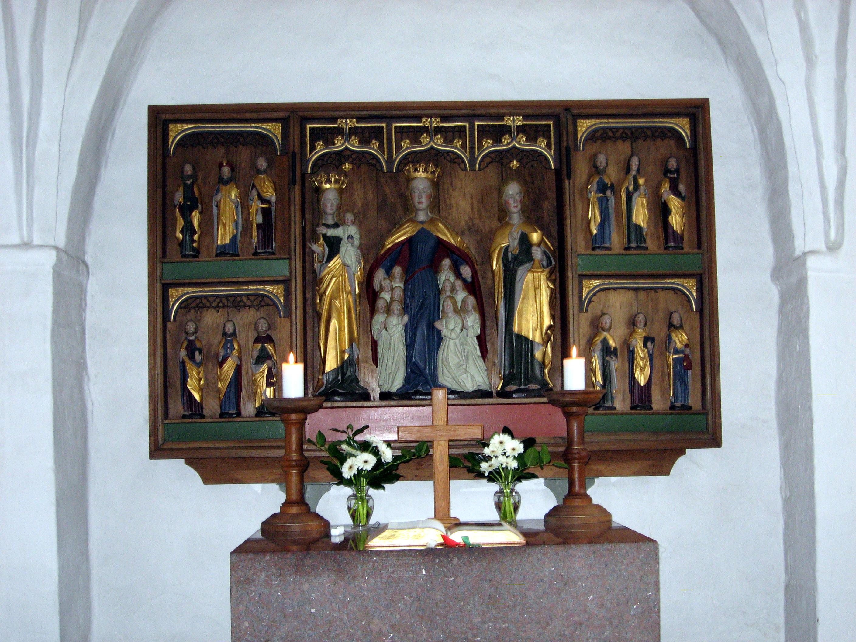 Altar piece from Tranbjerg Kirke in Tranbjerg Sogn, Århus Kommune, Denmark.